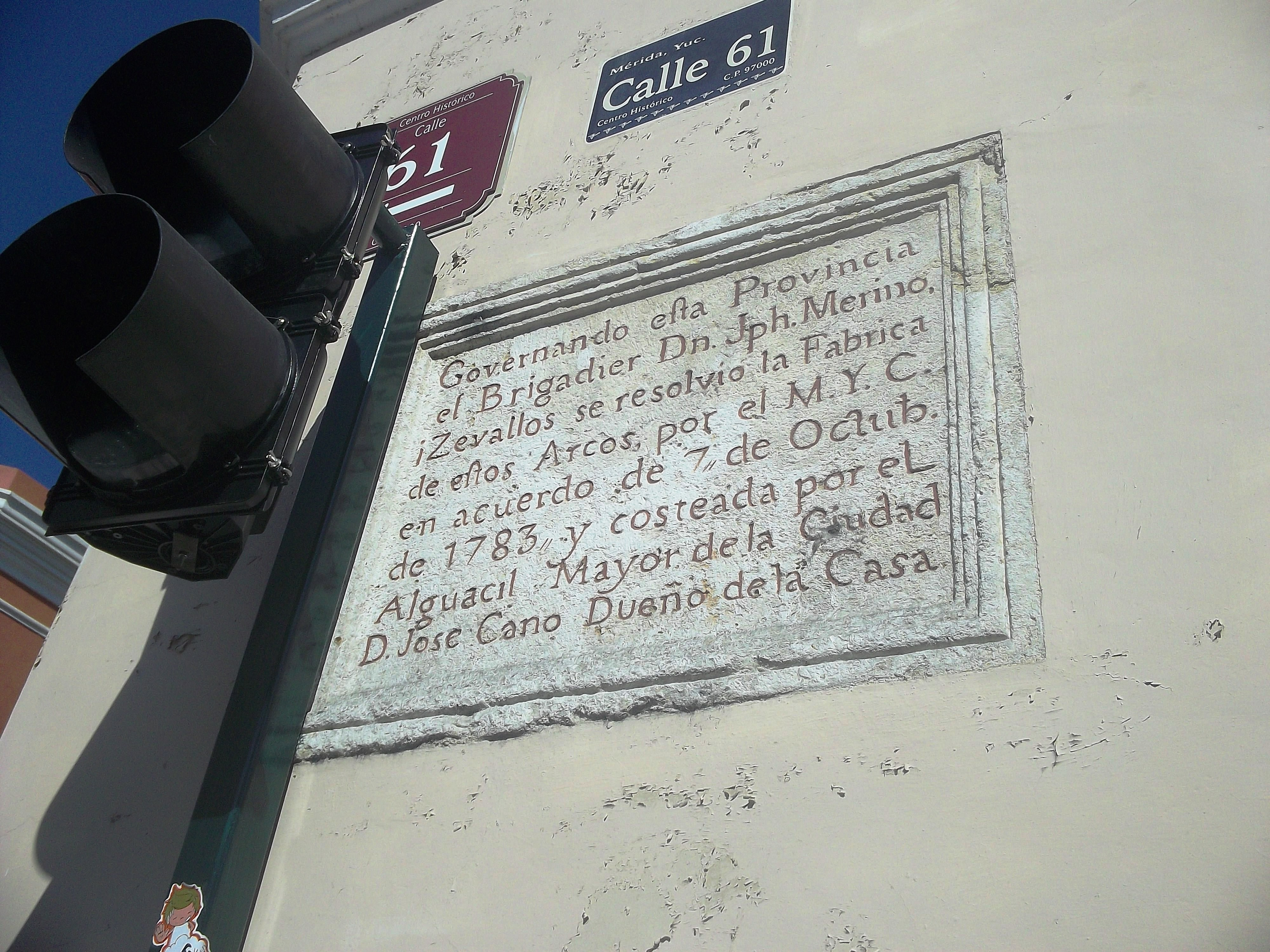 Placa alusiva José Merino y Ceballos en el Palacio de Gobierno, Mérida, Yucatán.